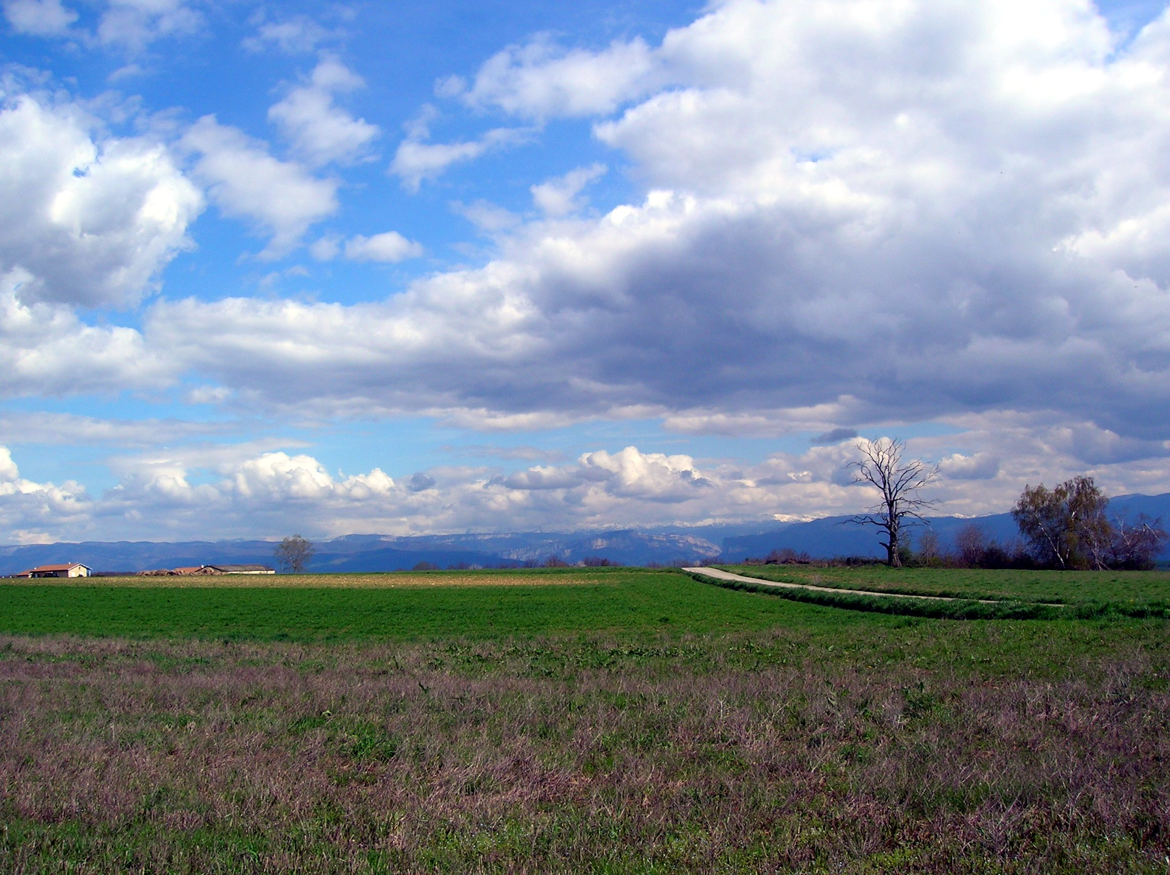 View of the Vercors from Montmiral, Drôme, France Vue sur le massif du Vercors depuis la commune de Montmiral, Drôme, France